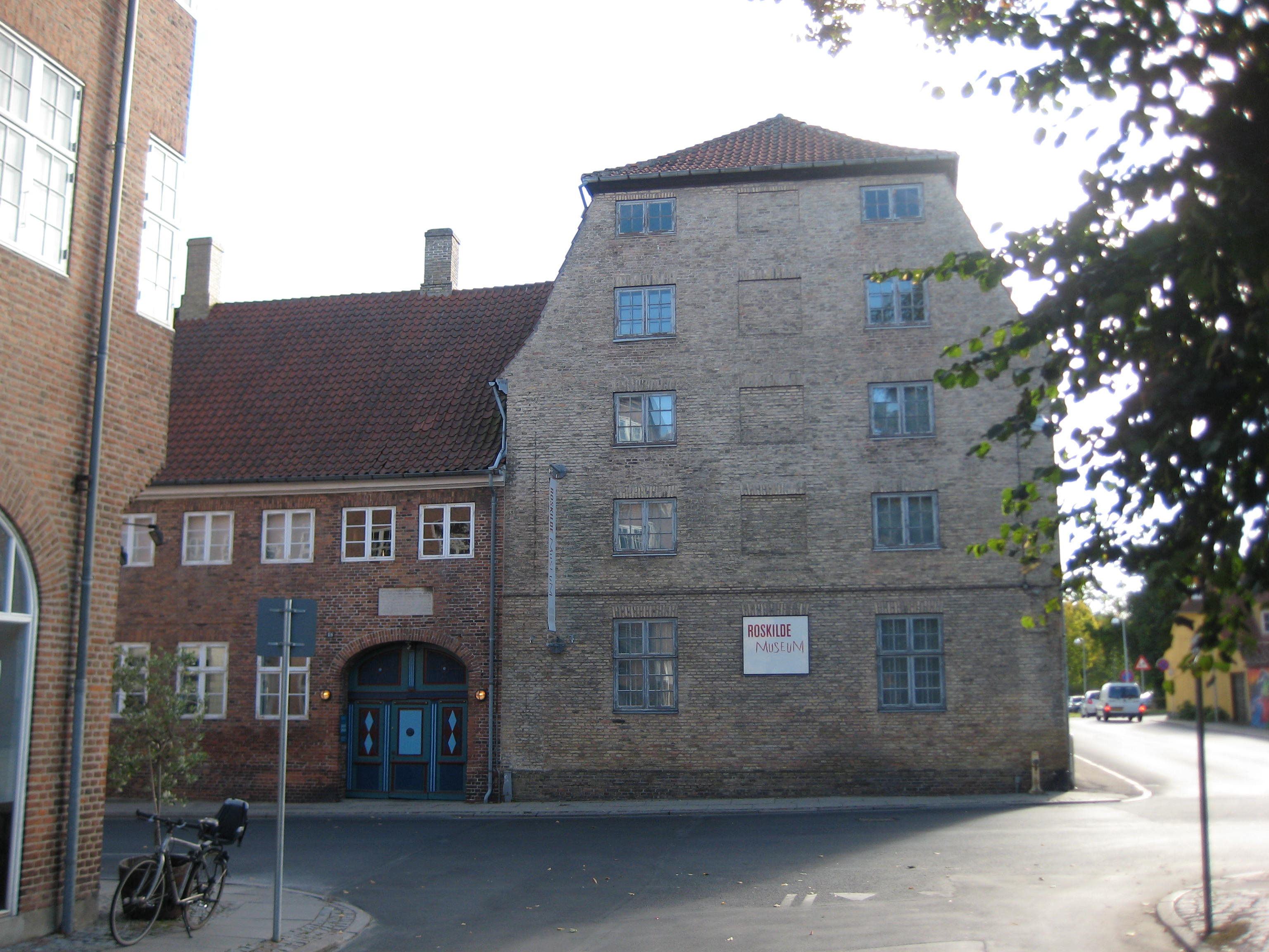 Sukkerhuset, Liebes Gård, Museum